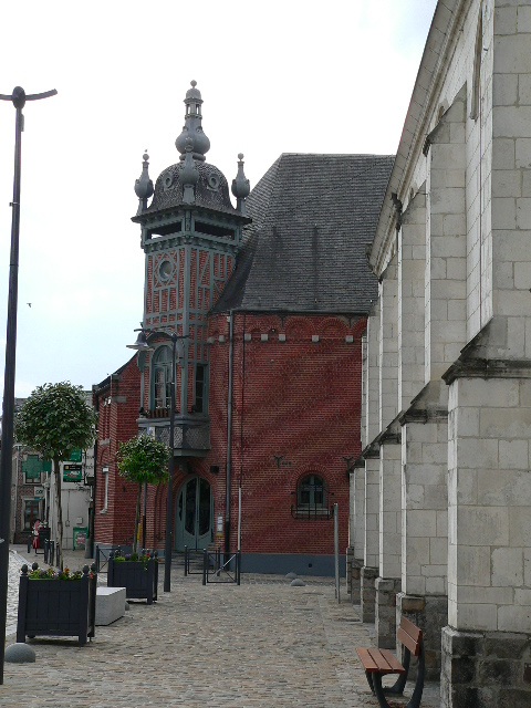 Centre - ancienne mairie de l'architecte Louis Bonnier